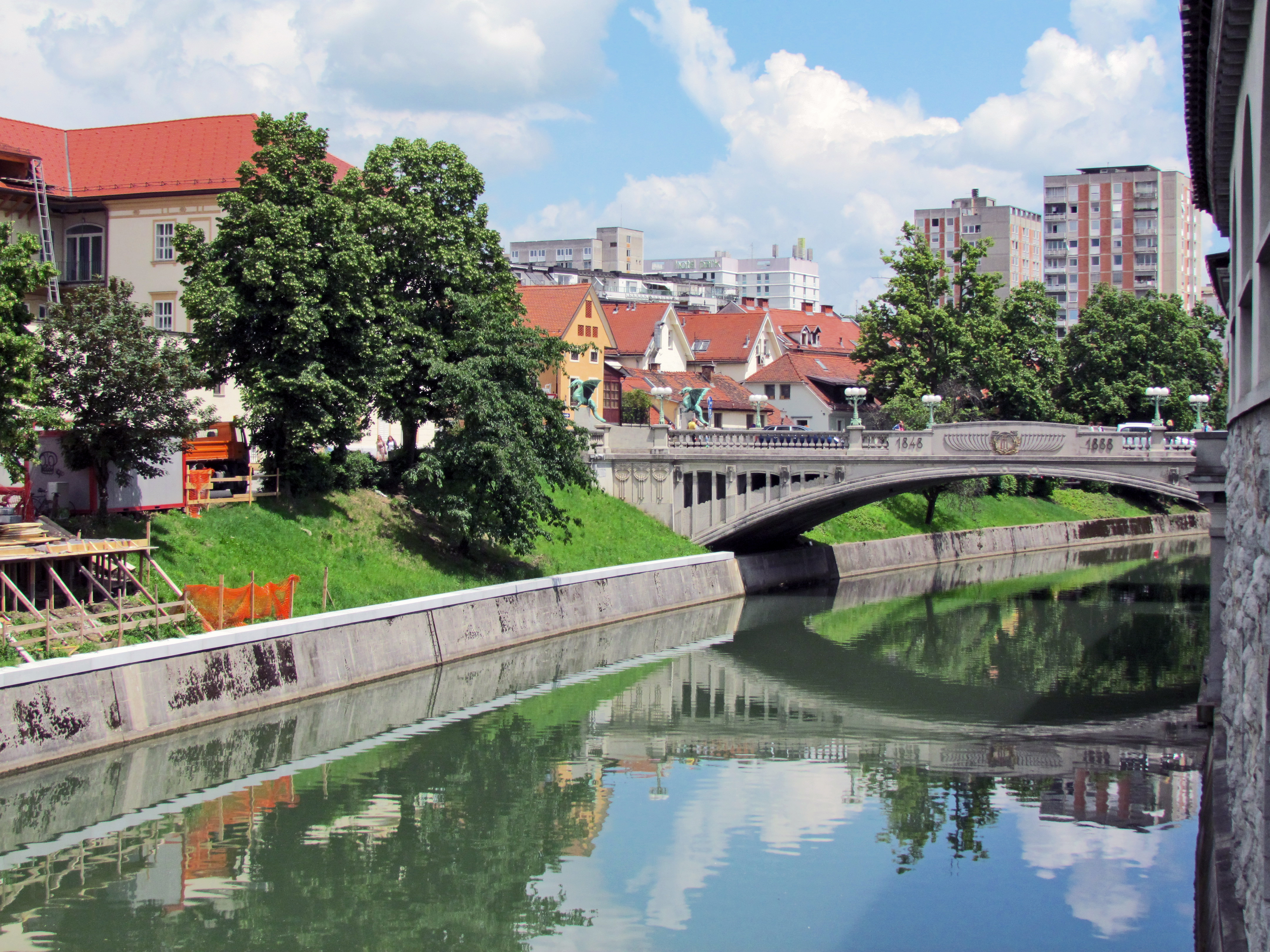 Ljubljana - Slovenia